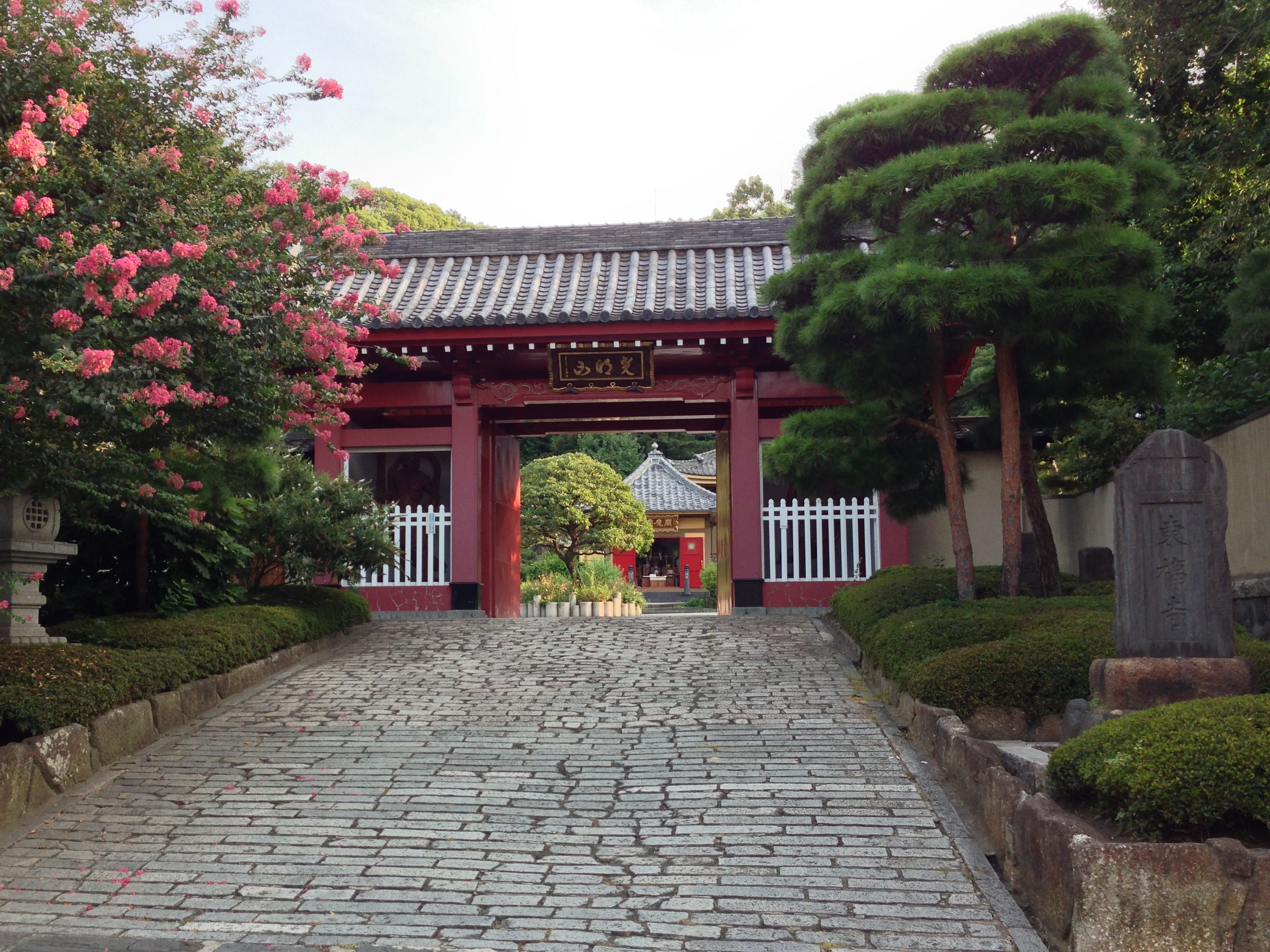 東福寺 赤門（神奈川県横浜市西区）